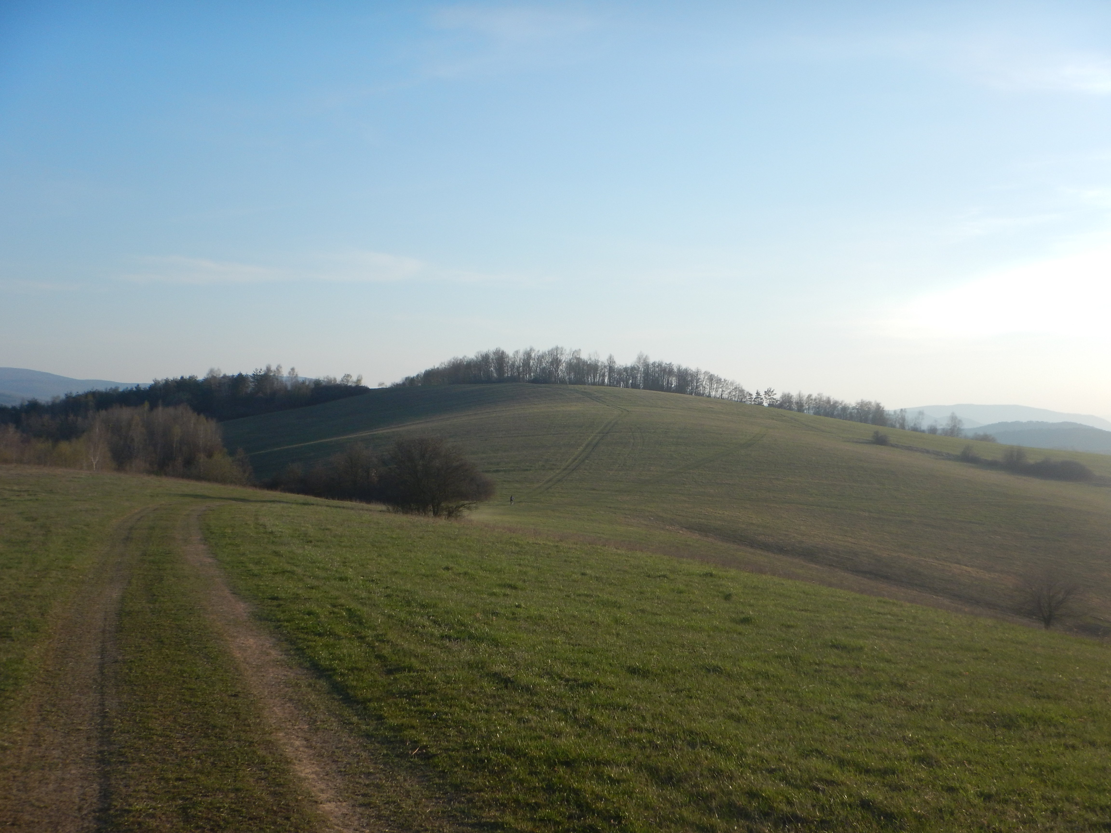 Fotografia zo severnej strany od dediny Rovné